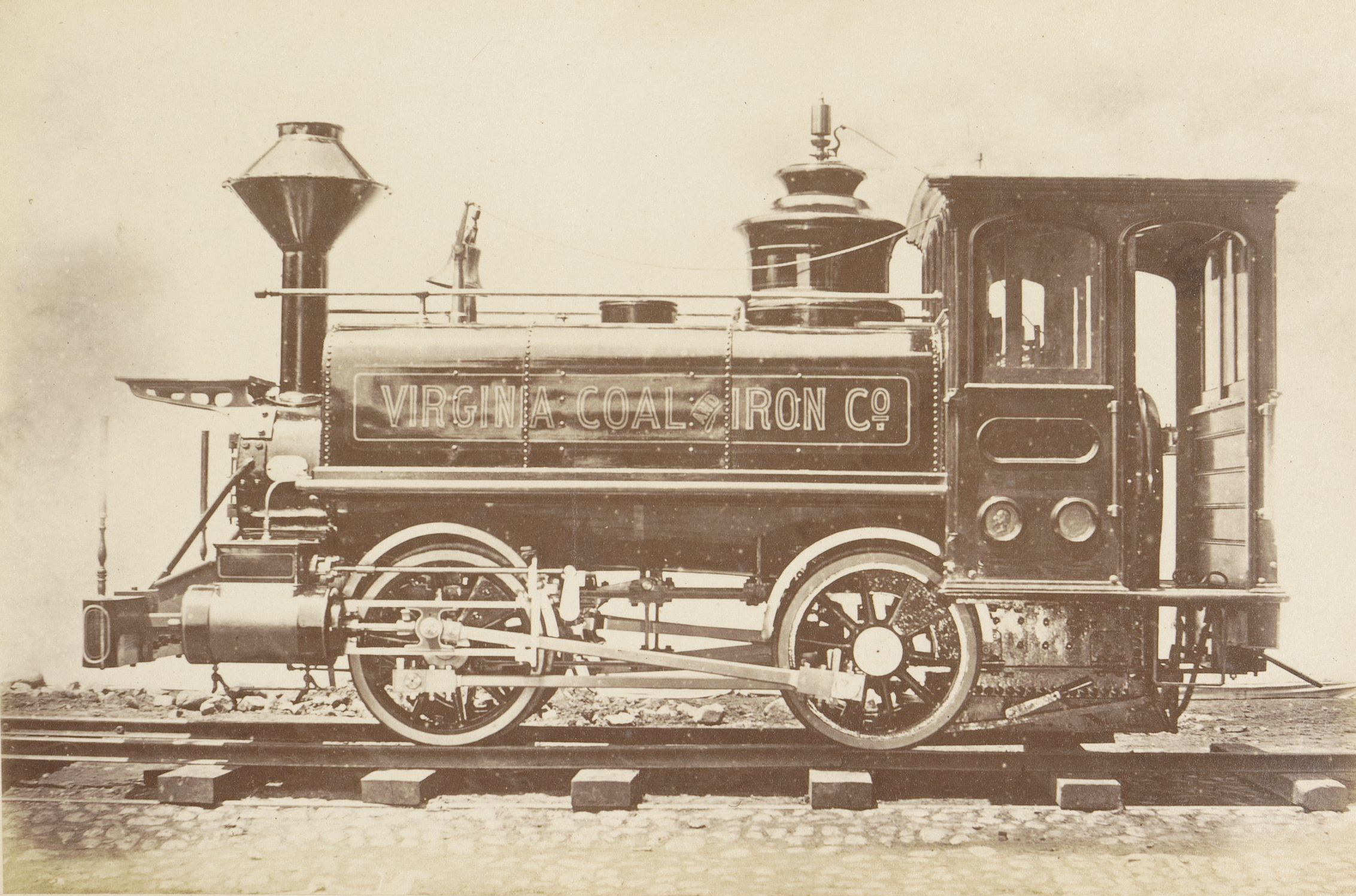 IdentificatieTitel(s): StoomlocomotiefObjecttype: foto bladzijde Objectnummer: RP-F-2001-7-1481-9VervaardigingVervaardiger: fotograaf: George Gardner Rockwood (mogelijk)Datering: ca. 1861 - in of voor 1871Materiaal: fotopapier Techniek: albuminedrukAfmetingen: foto: h 139 mm × b 201 mmOnderwerpWat: steam locomotiveVerwerving en rechtenCredit line: Aankoop met steun van de Mondriaan Stichting, het Prins Bernhard Cultuurfonds, het VSBfonds, het Paul Huf Fonds/Rijksmuseum Fonds en het Egbert KunstfondsVerwerving: aankoop 2001Copyright: Publiek domein